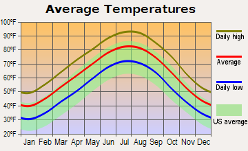 Average temperature in Little Rock, Arkansas.